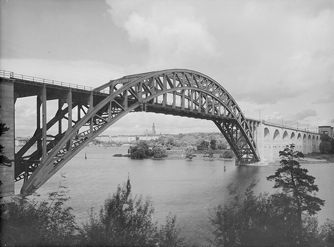 Årstabron i Stockholm efter invigningen